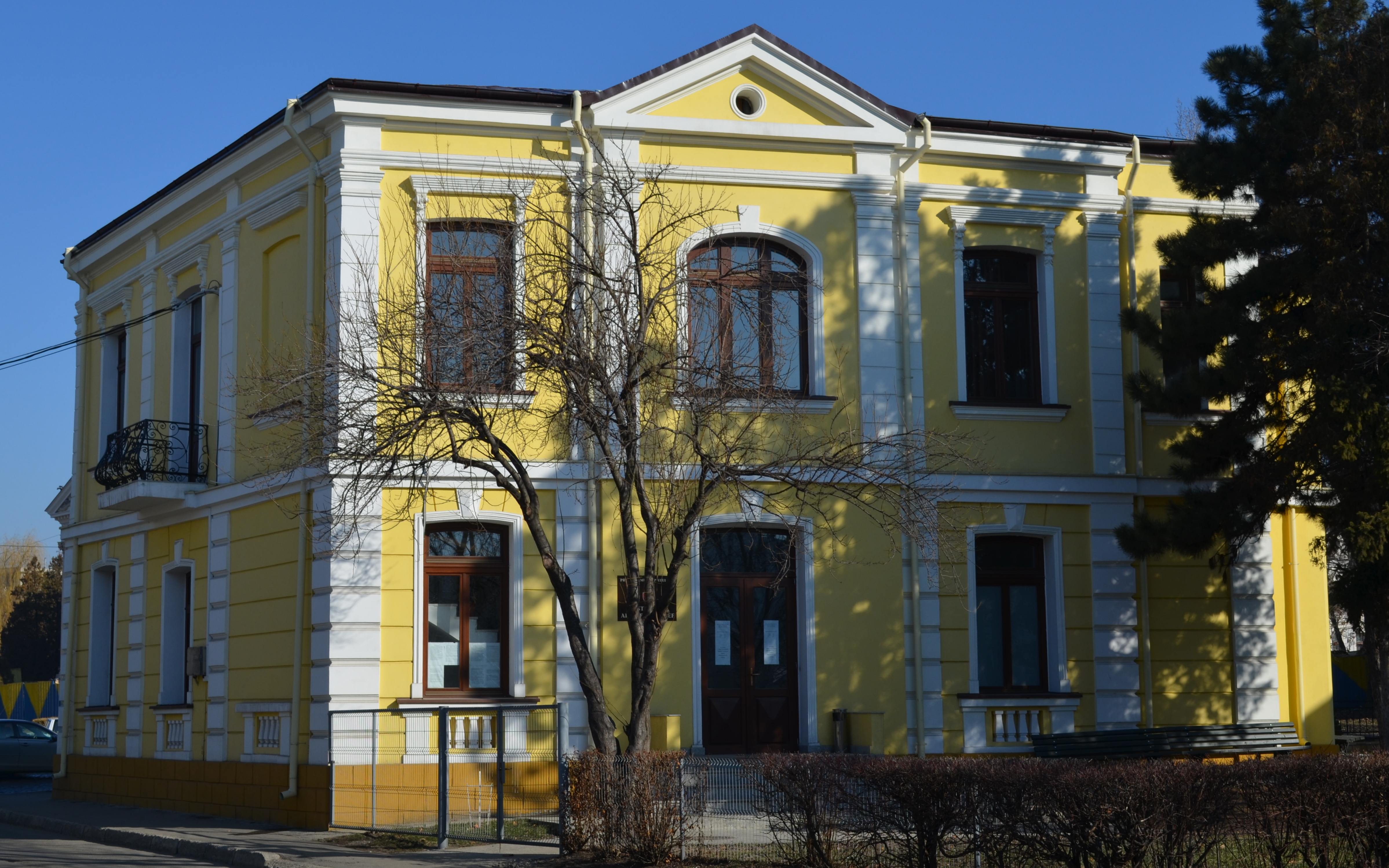 Casă, Str. Agatha Bârsescu nr. 16, Iași. A fost construită la sfârșitul secolului al XIX-lea și renovată recent (2009-2010). Fostul sediu al Casei Județene de Pensii, acum Instituția Arhitectului Șef.